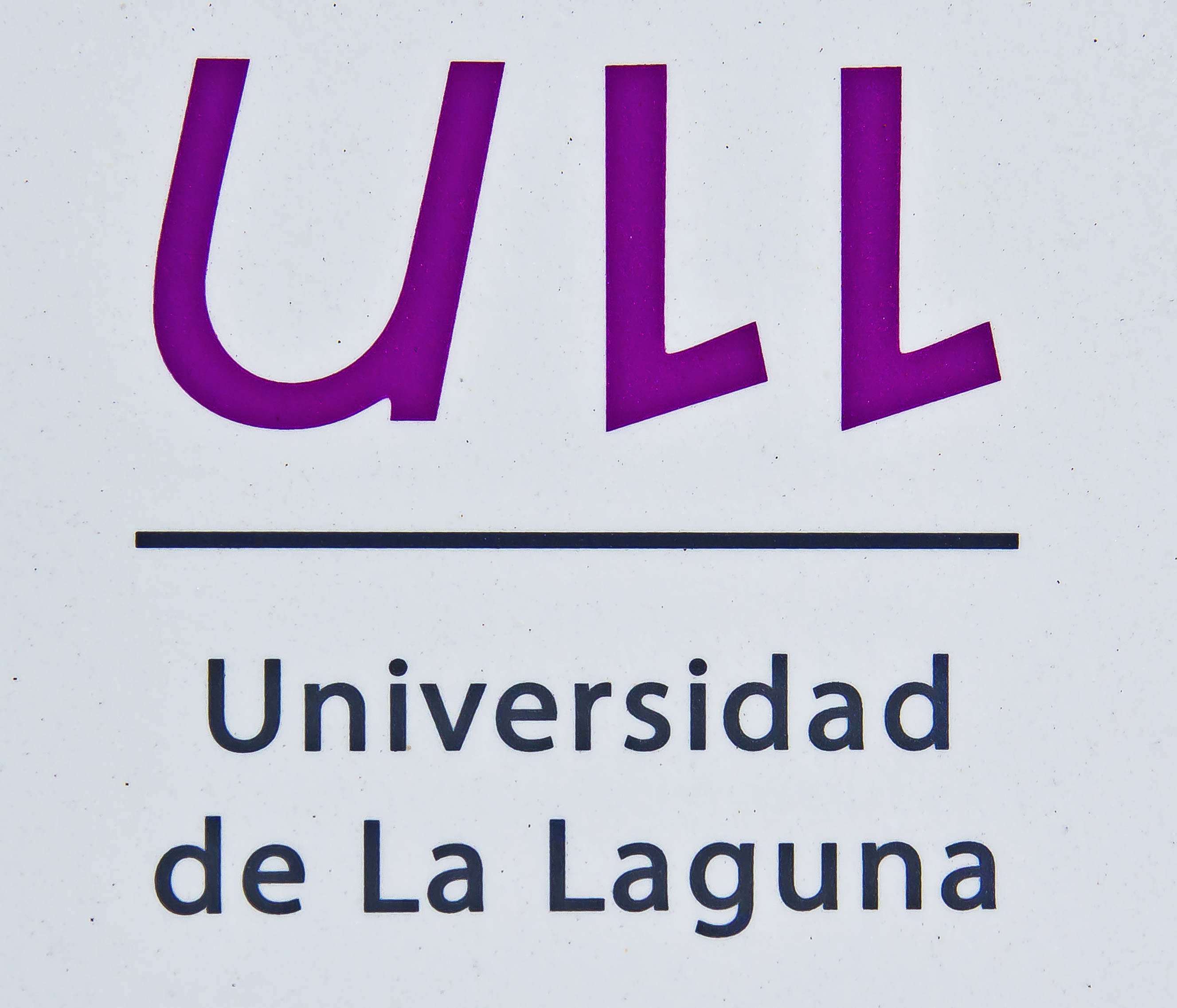 Logo der Universidad de La Laguna auf einem dauerhaft in der Öffentlichkeit angebrachten Hinweisschild.